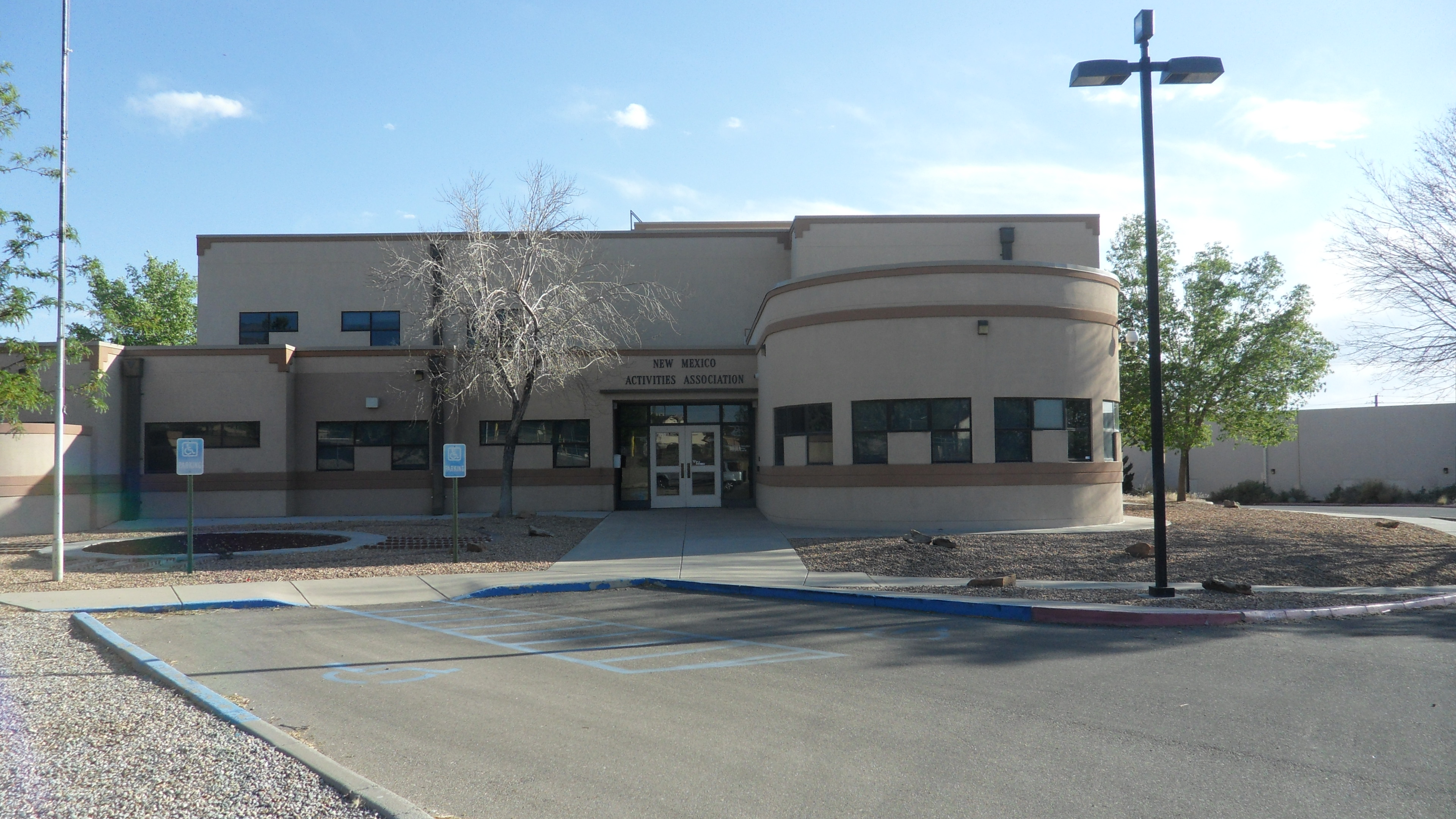 New Mexico Activities Association Offices; 6600 Palomas NE Albuquerque, NM 87109